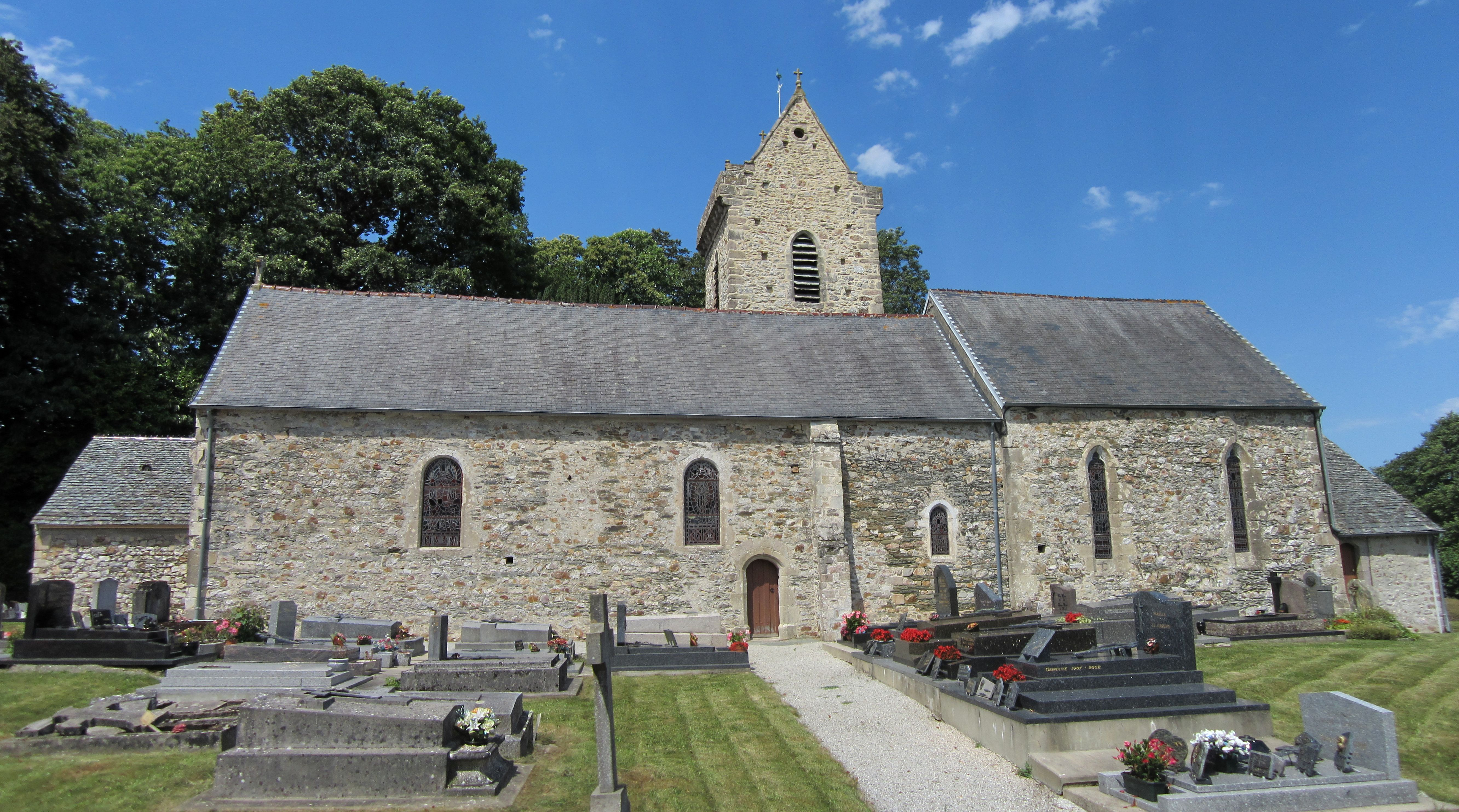 église Saint-Ouen de Sideville, Manche